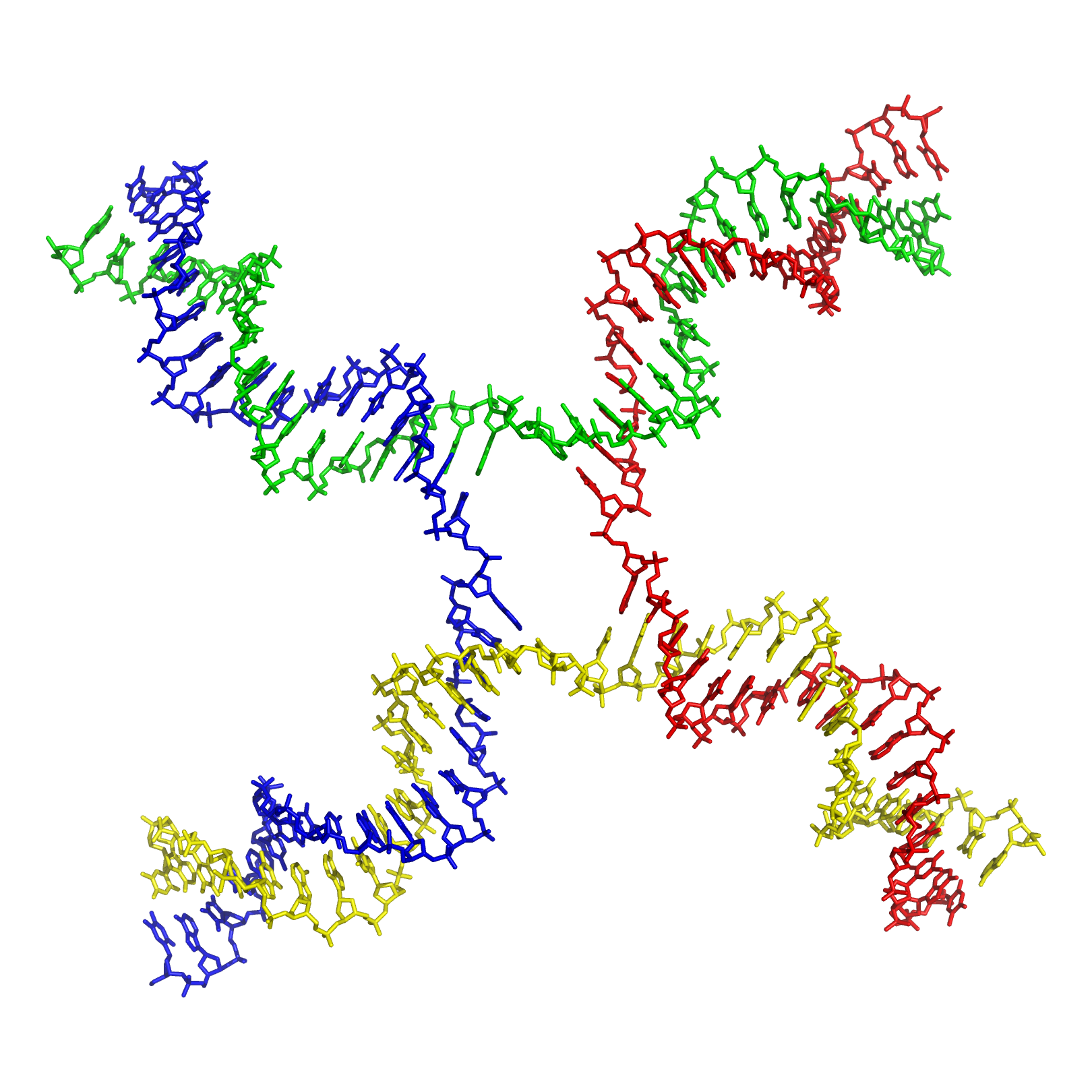 By Richard Wheeler (Zephyris) 2007.